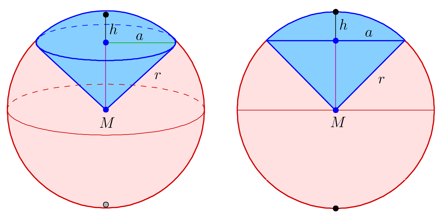 Kugelsektor